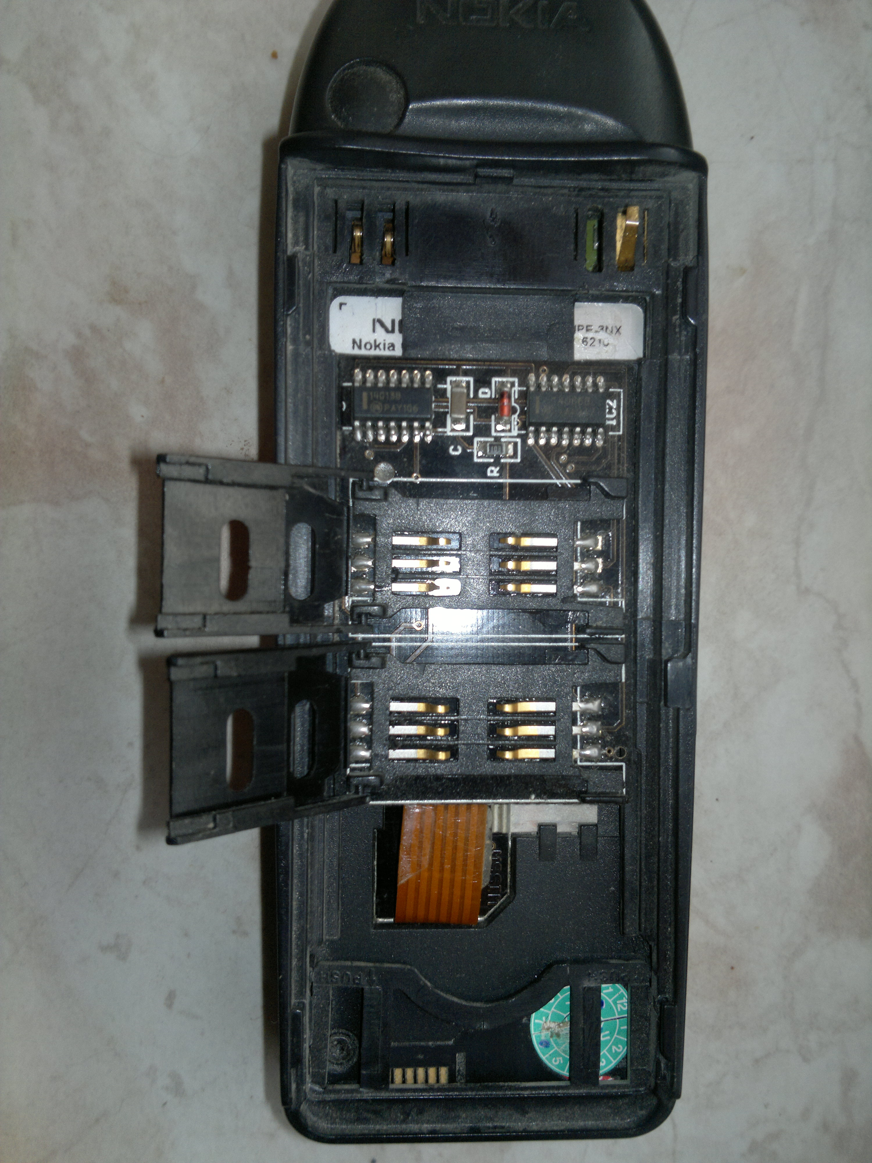 Dual Sim Adapter auf dem Nokia 6210 montiert mit den 2 Karten einschüben